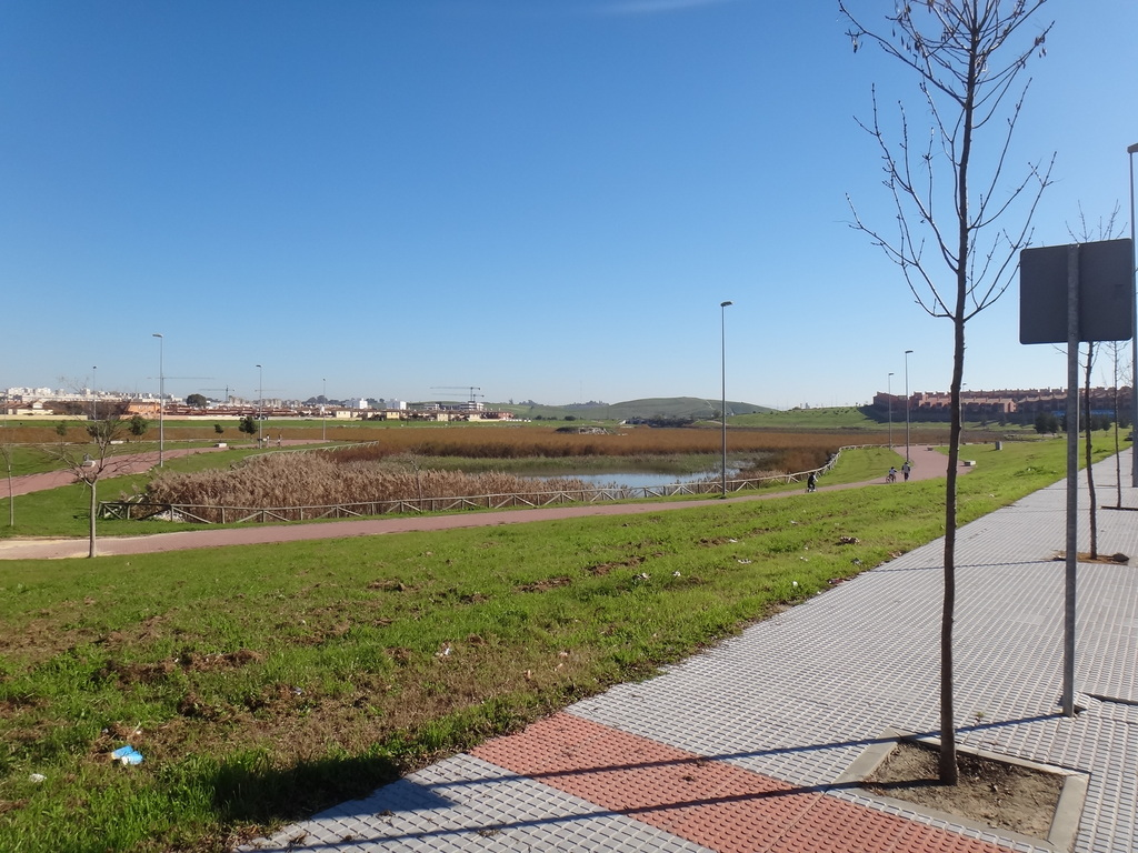 Laguna de Torrox. Jerez de la Frontera (Andalucía, España). Vista hacia Jerez sur